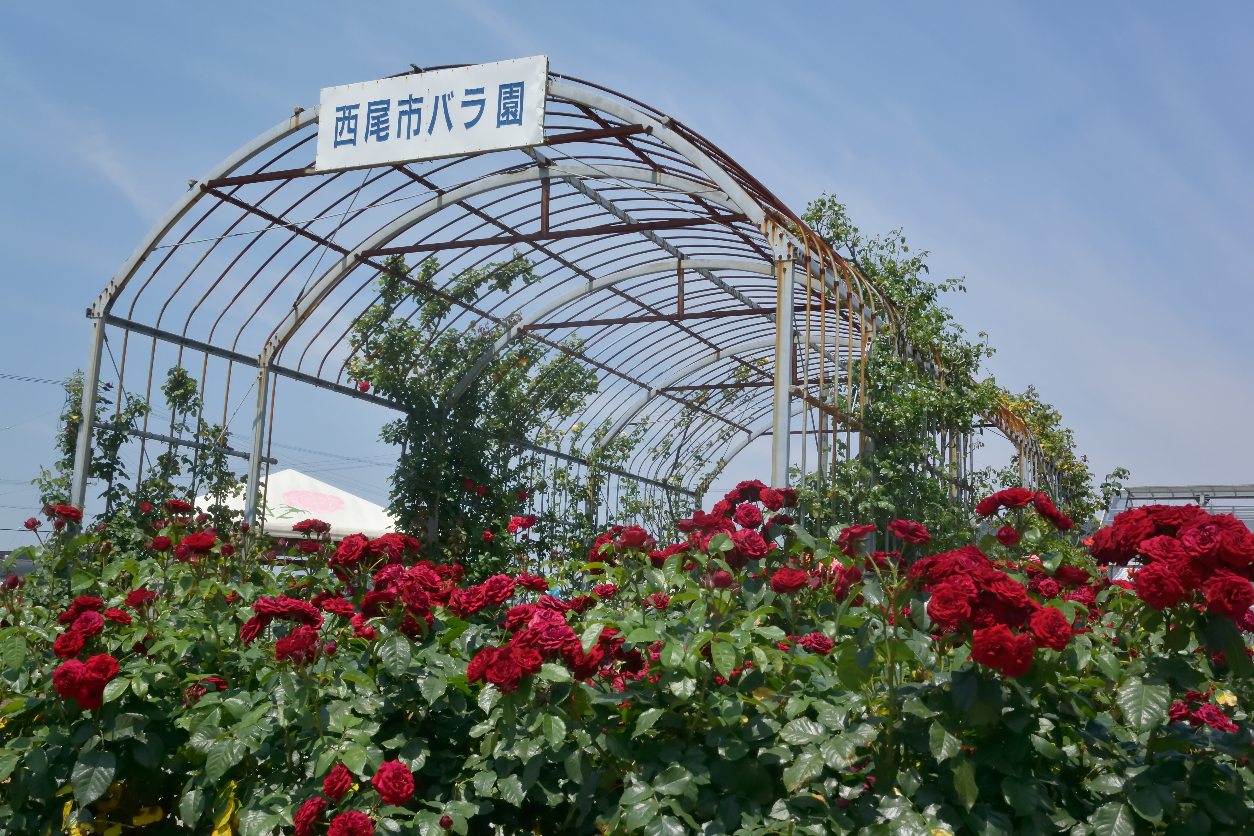 西尾市憩の農園出口